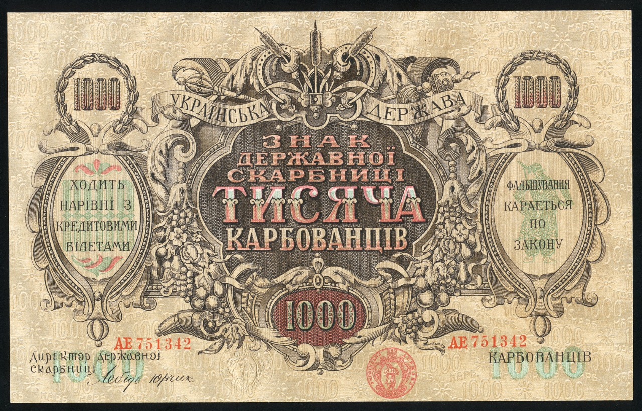 1.000 karbovanets 1000 карбованцев Украинской Державы гетмана Скоропадского. 1918